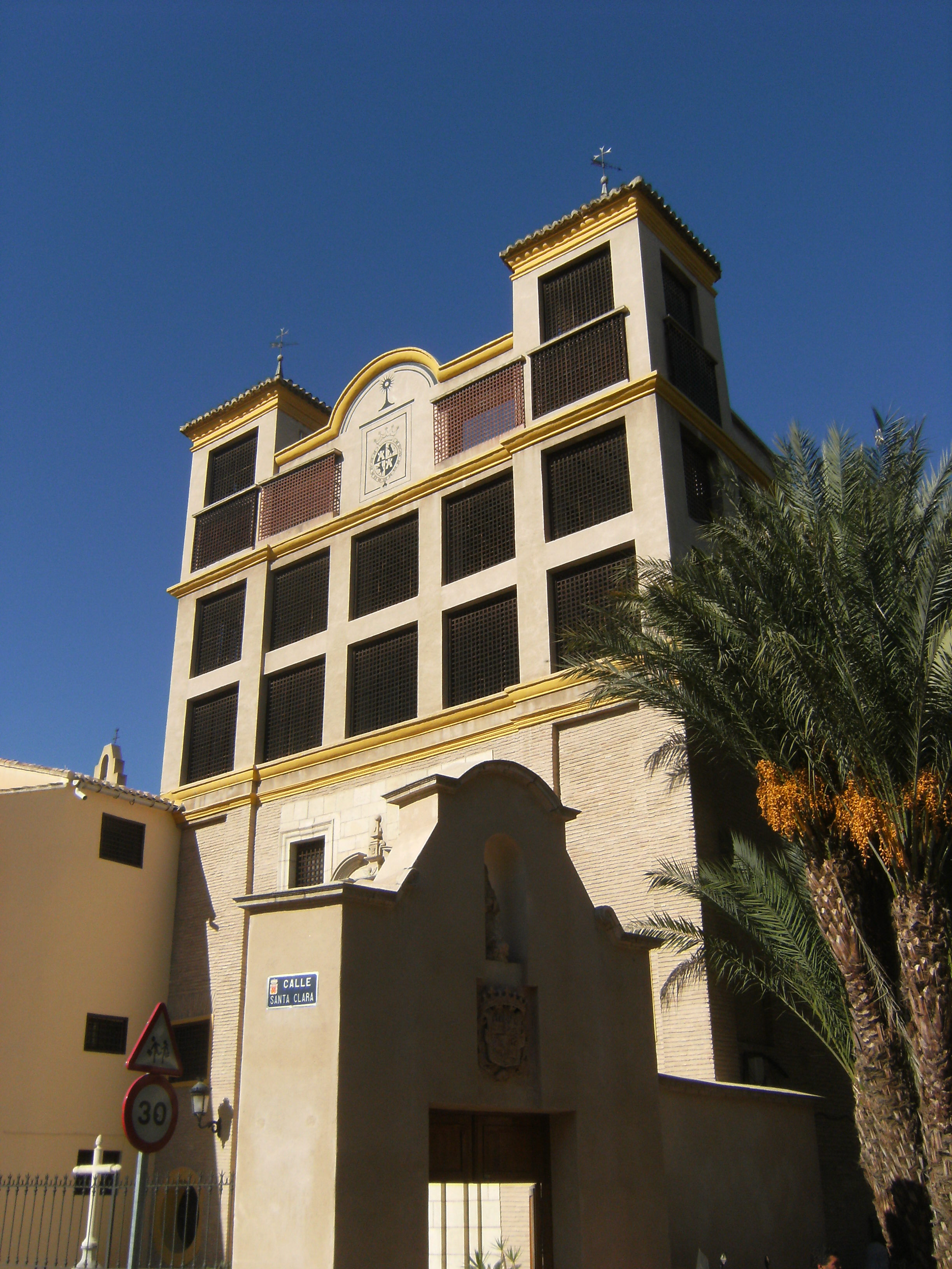 Fachada de la iglesia del Monasterio de Santa Clara la Real, Murcia (España).